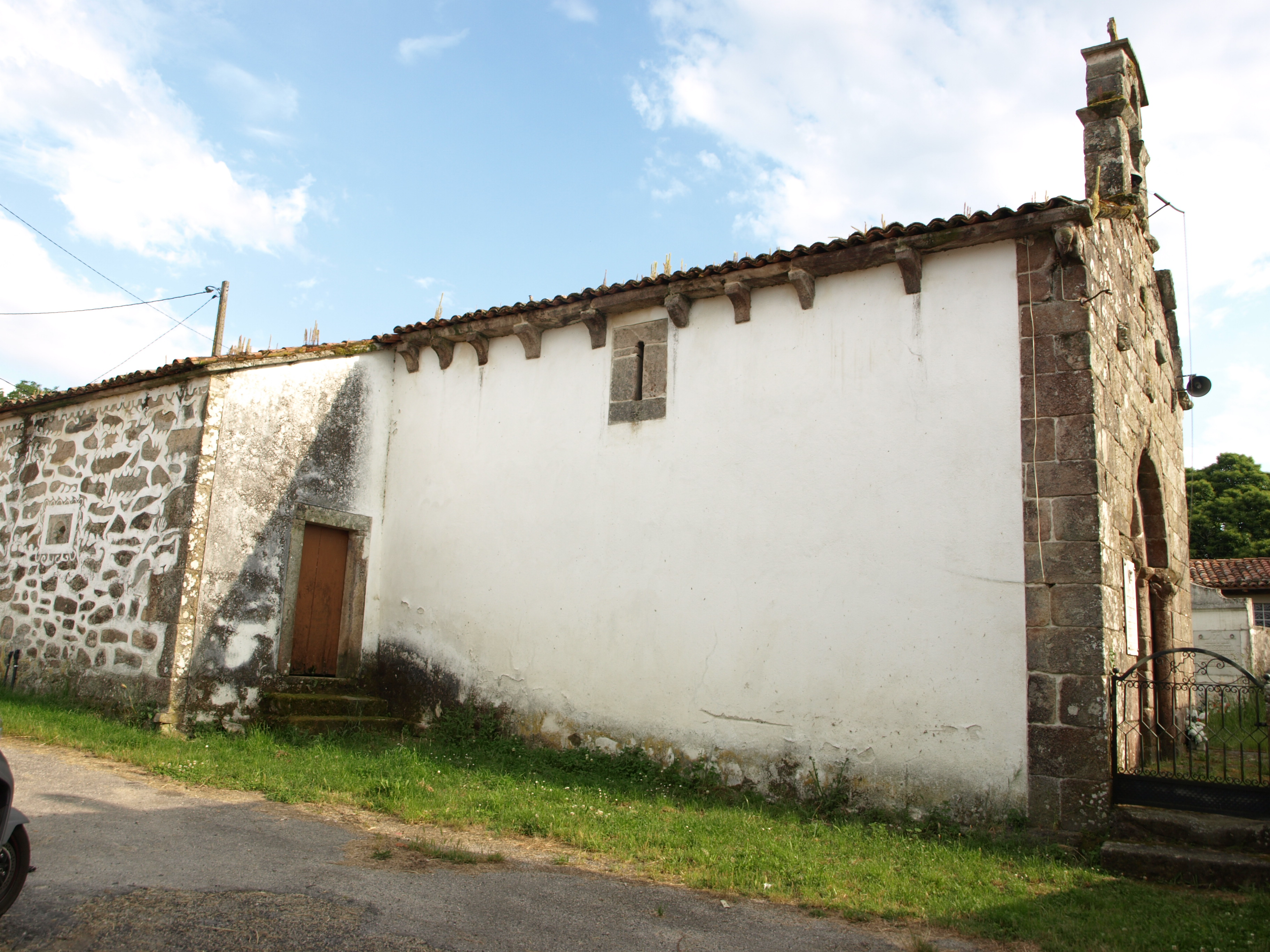 Igrexa parroquial de Santa María de Alvidrón (Antas de Ulla)